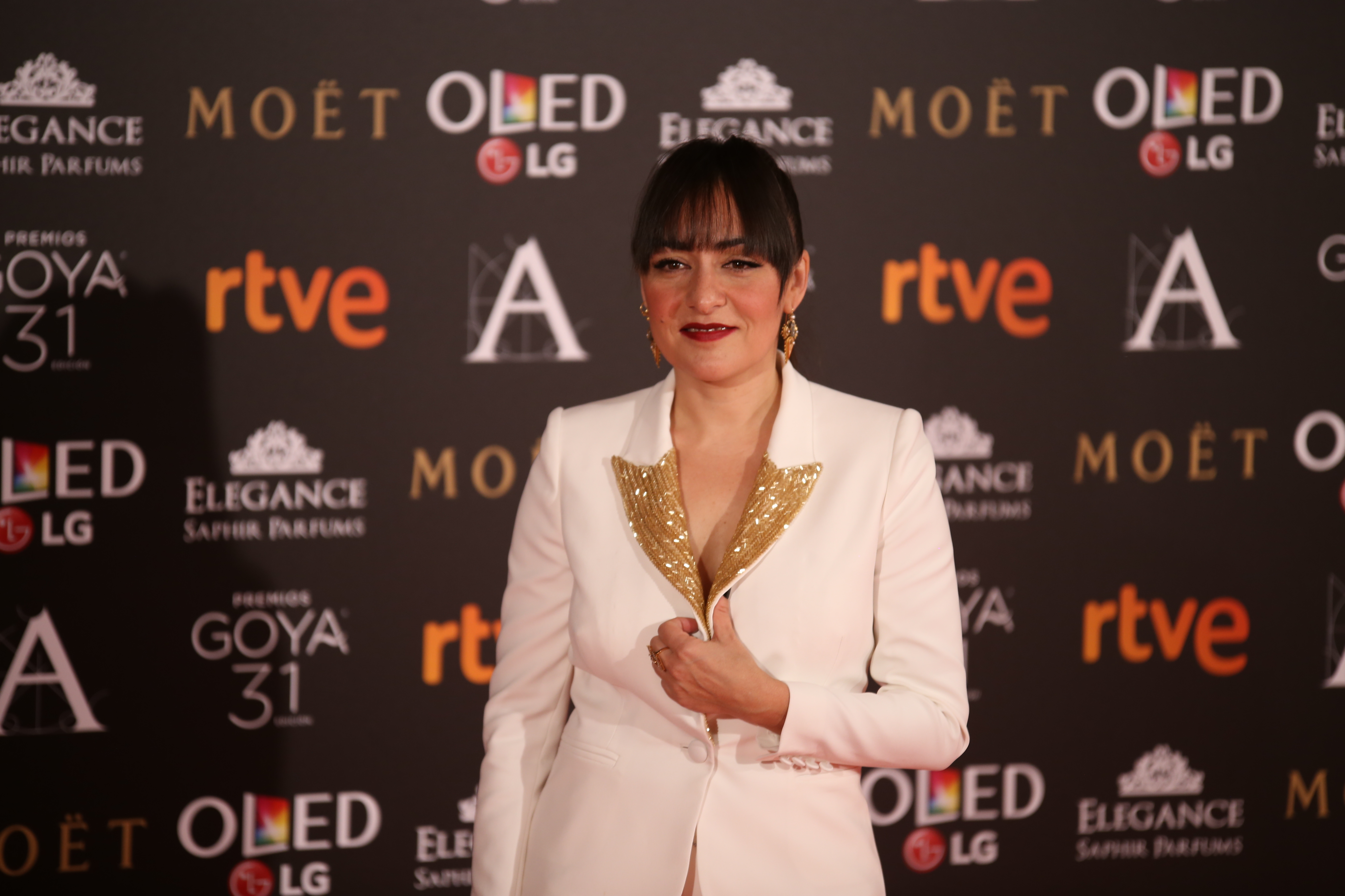 Premios Goya 2017